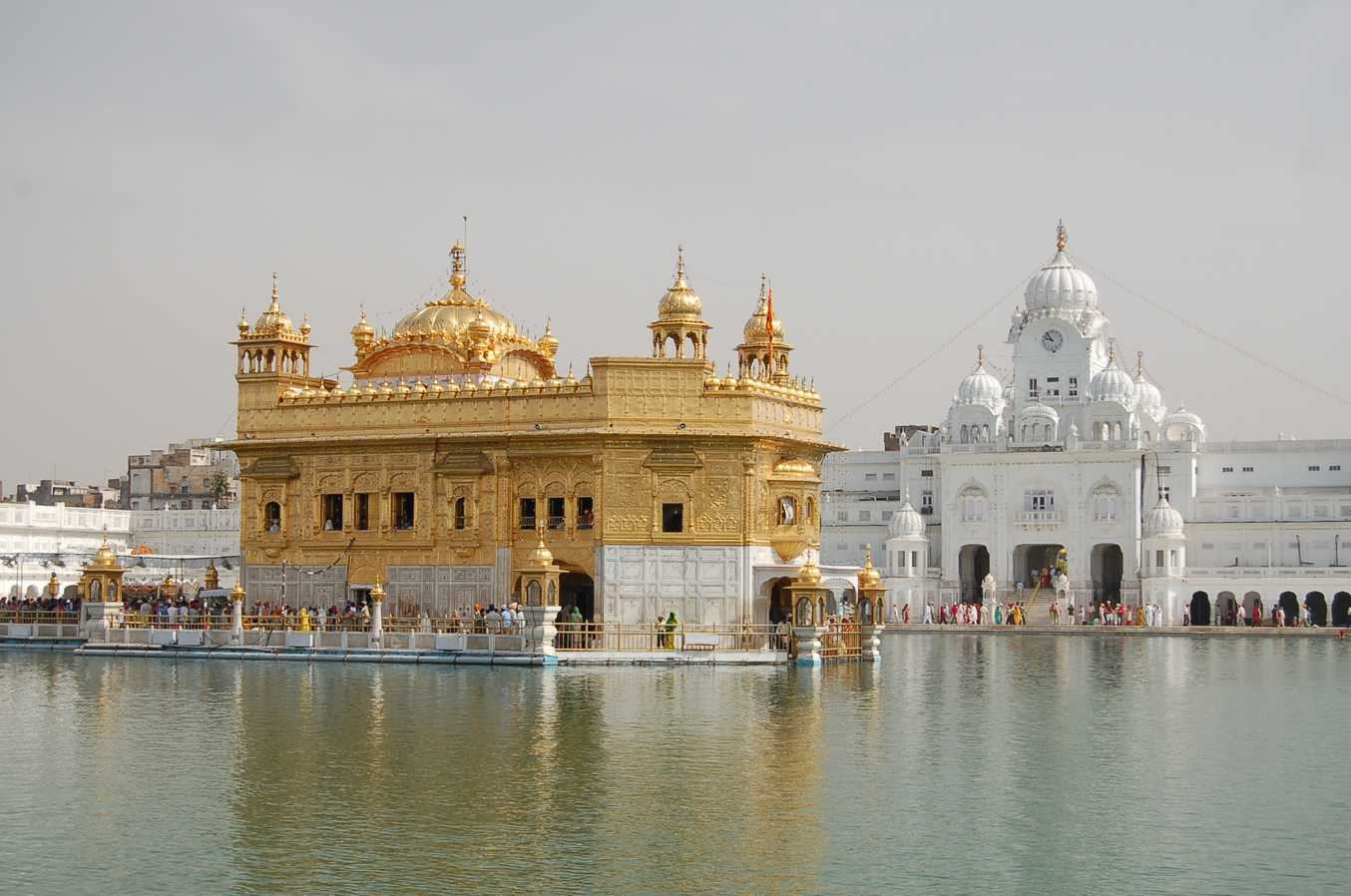 Eigenes Foto